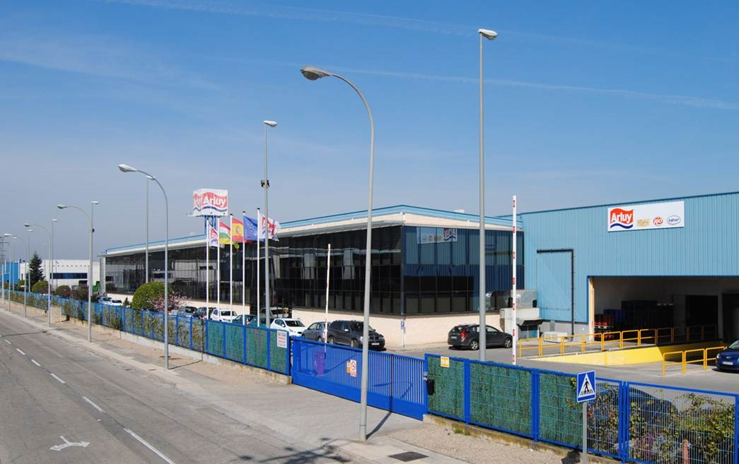 FOTO EXTERIOR